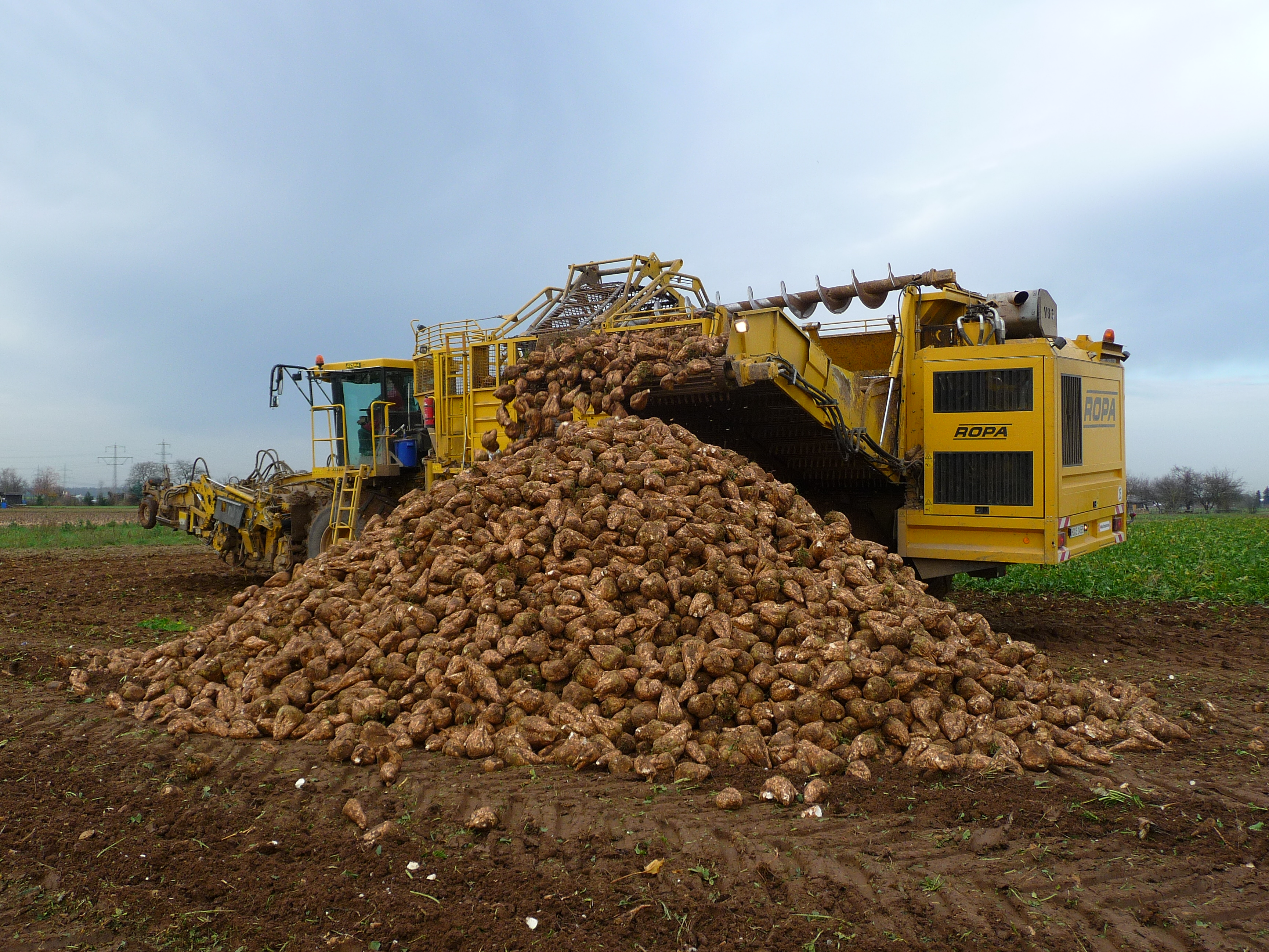 Zuckerrübenvollernter ROPA euro-tiger V8-3 beim Entladen, aufgenommen im Rhein-Neckar-Kreis (Baden-Württemberg, Deutschland); DaimlerChrysler V8 Dieselmotor mit 436kw (604 PS), Länge 14,95 m, Höhe 4 m, Leistungskapazität bis 2ha/Stunde, Bunker mit 40 m³ Ladevolumen, Entladung binnen 60 Sekunden